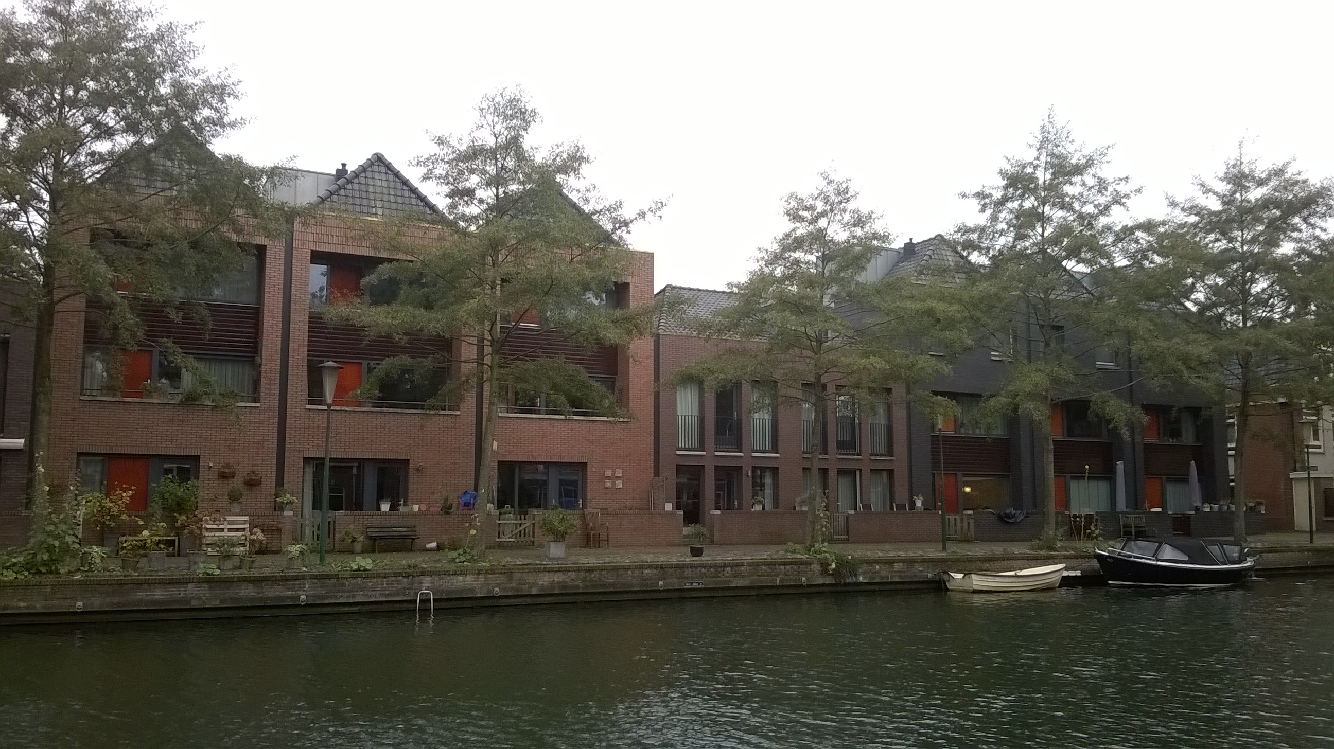 Woningen aan de straat het Jeudje. Dit is de achterzijde.